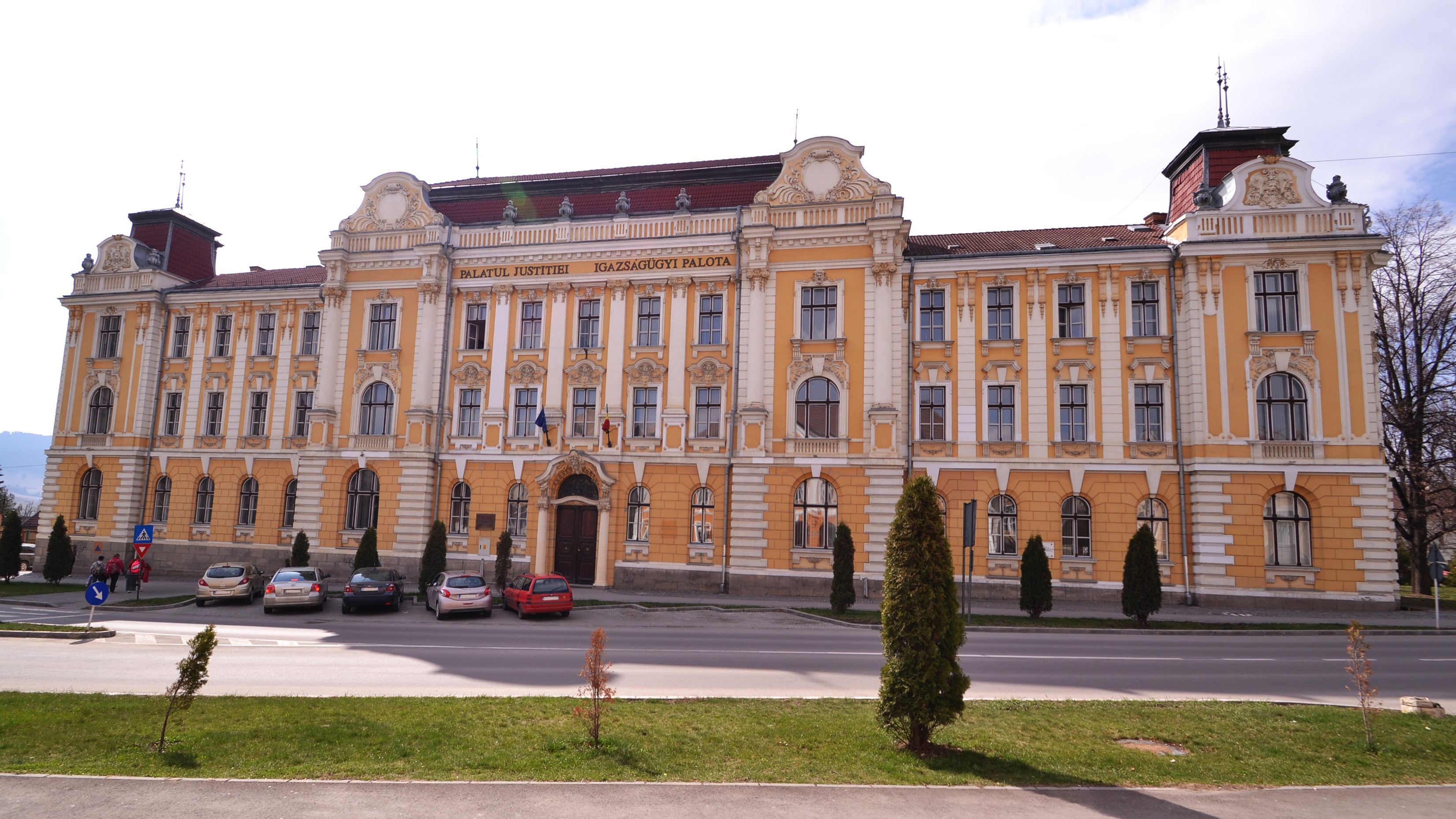 palota